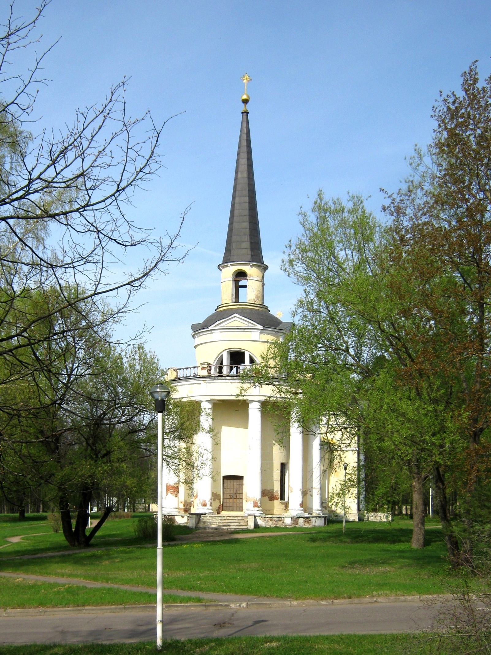 Усадьба Шереметева-Гудовича «Введенское»: с. Введенское, Звенигород, Московская область